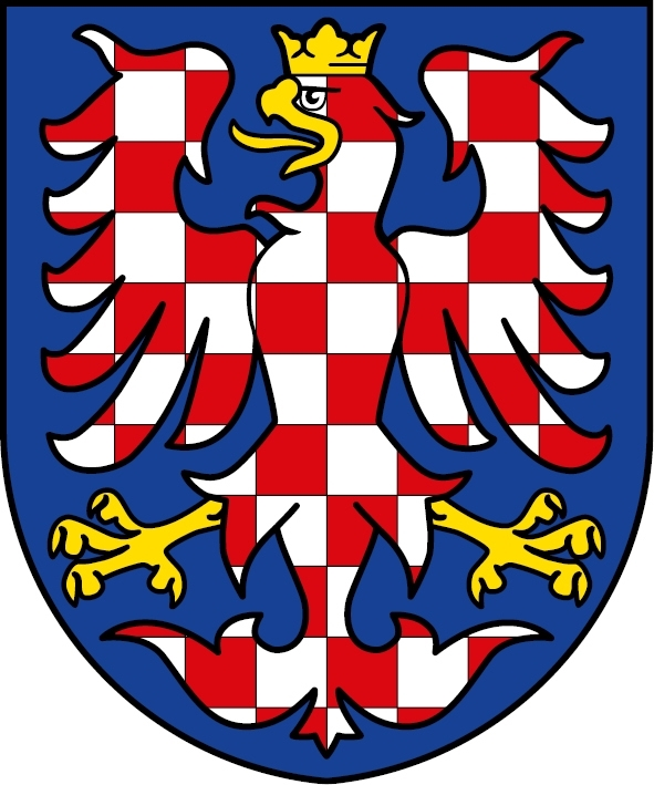 Znak Moravy